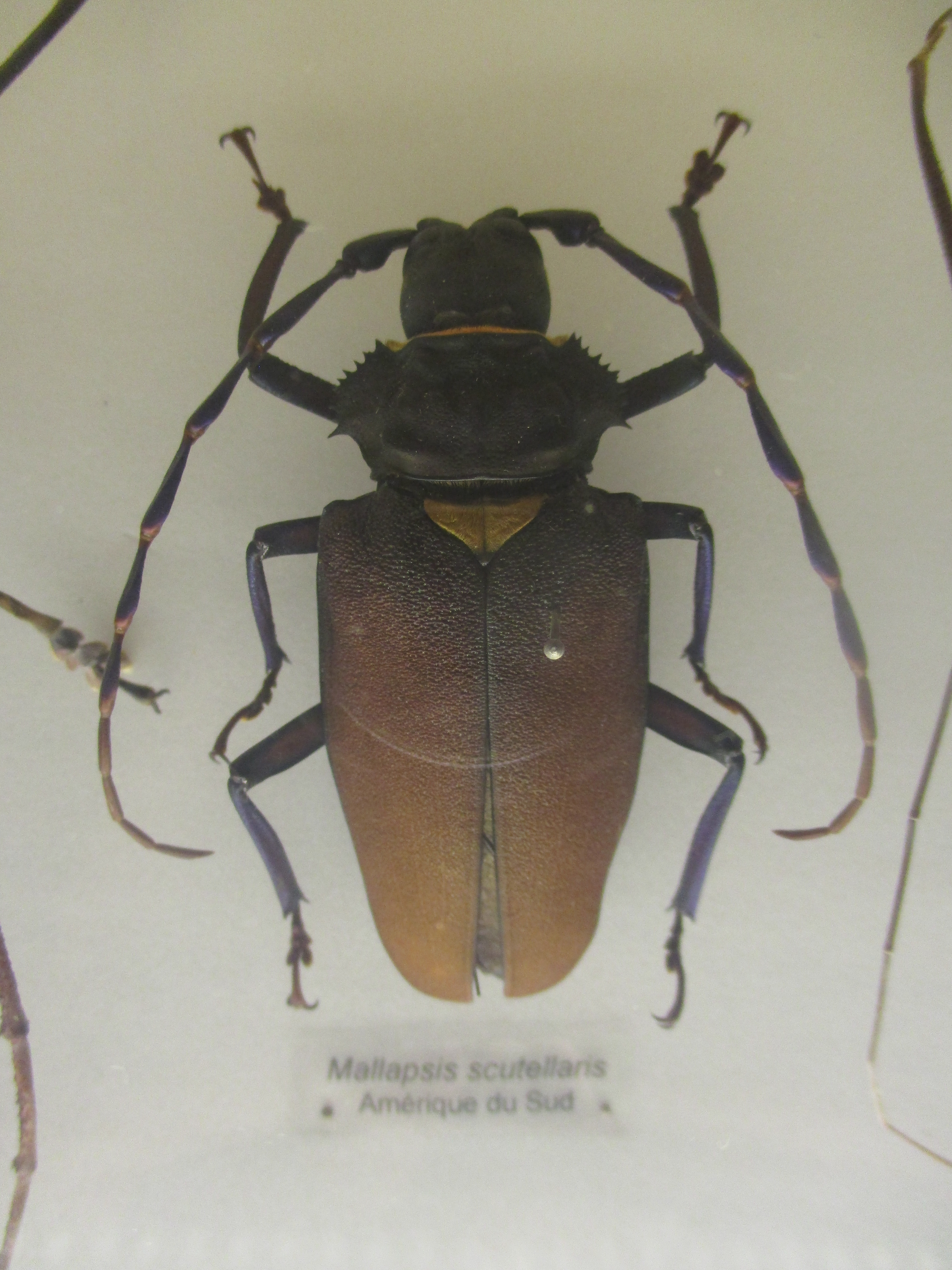 Spécimen de Mallaspis scutellaris Olivier, 1795 (Amérique du Sud), collection du musée zoologique de Strasbourg.